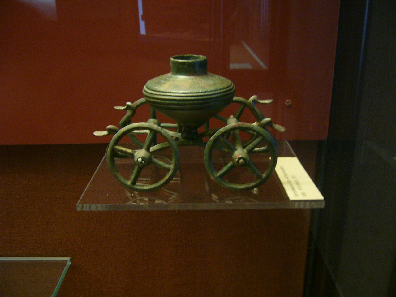 Kesselwagen von Acholshausen — Exponat im Mainfränkischem Museum Würzburg